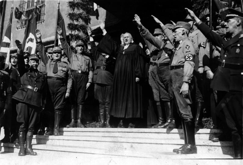 Wittenberg, Nationalsynode Eröffnung der Nationalsynode in Wittenberg. Landesbischof Ludwig Müller (der spätere Reichsbischof) beim Heilruf mit dem faschistischen Gruß auf Adolf Hitler. 1933 Abgebildete Personen: Müller, Ludwig: Evangelischer Theologe, 1934 Reichsbischof, Deutschland